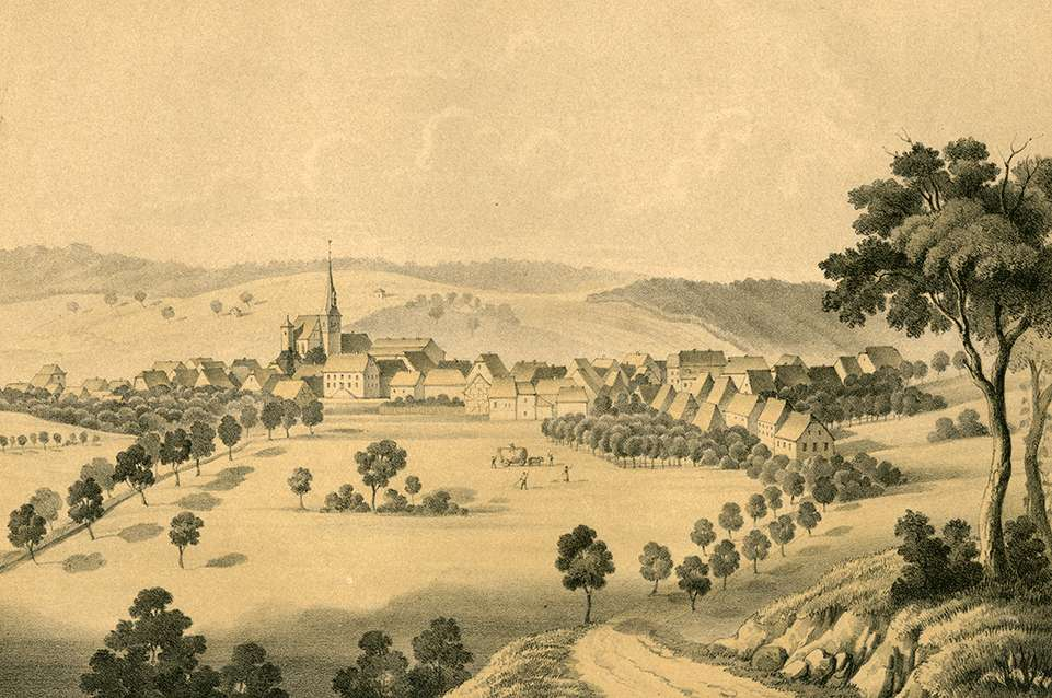 Sindolsheim, Südansicht um 1860. Titel "Gesamtansicht mit Heuernte im Vordergrund", Lithographie über Tonplatte Format 21,8 x33,2 cm, Gebräunt